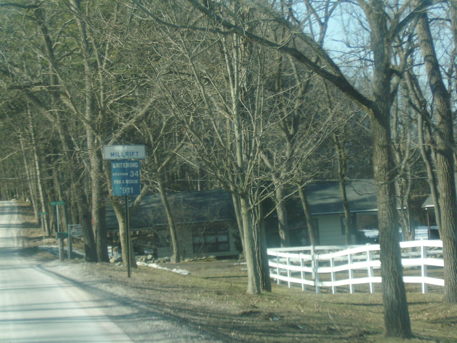 Pike County Quadrant Route 1017 entering Millrift, Pennsylvania.